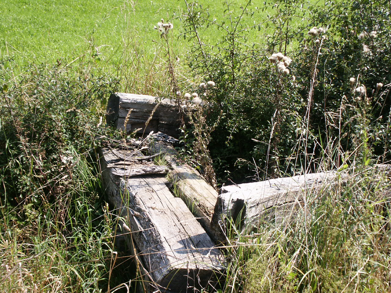 Wandern um Heenes